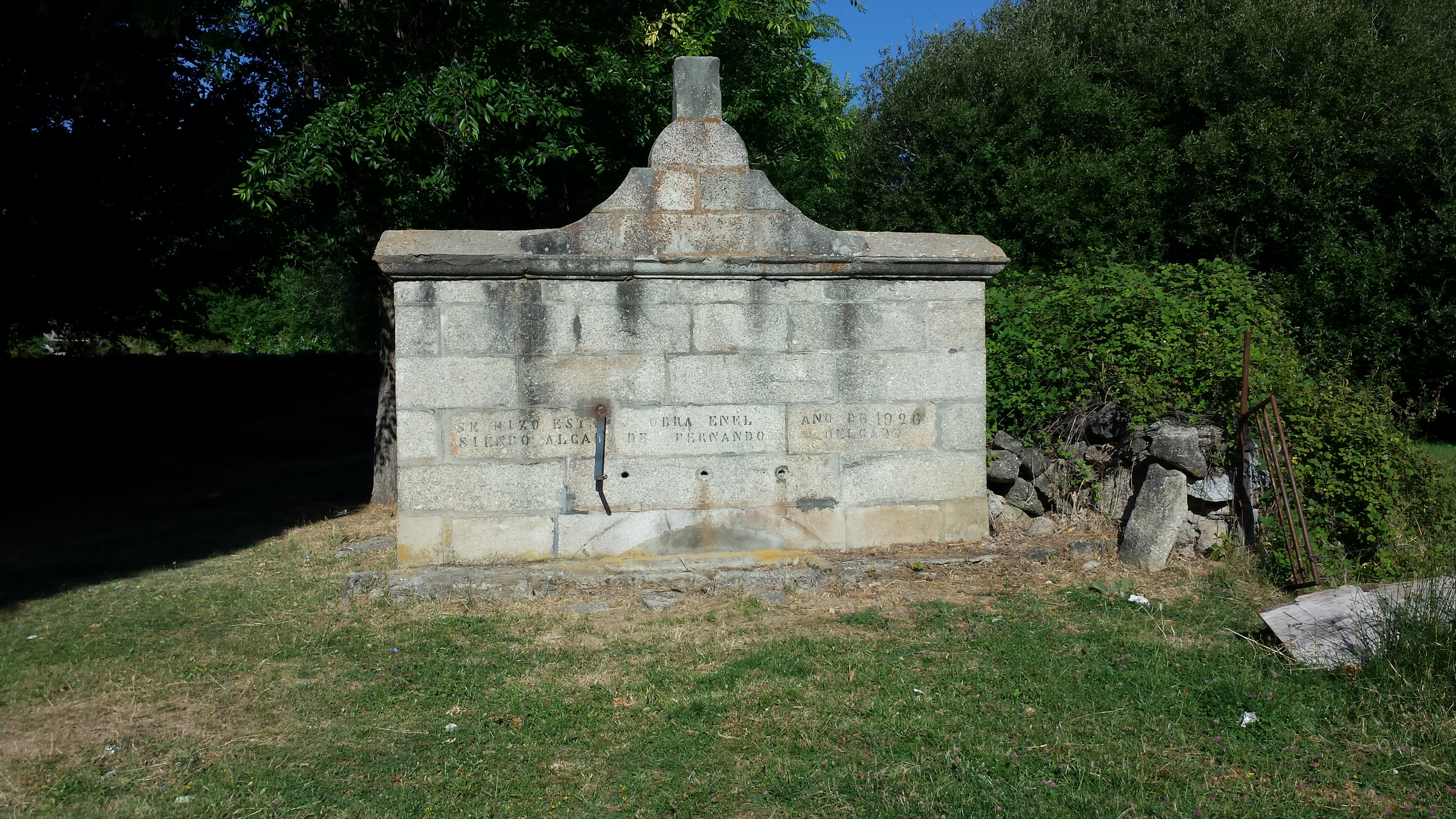 Fuente de la manivela, Muñana, Ávila, España.